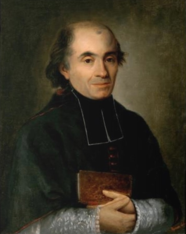 Père Pierre Bonhomme